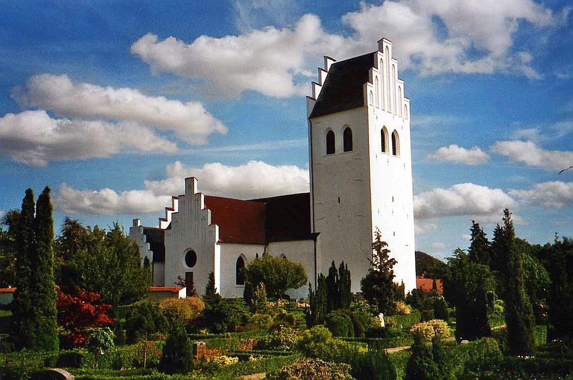 Herfølge Kirke, Herfølge Sogn, Køge Kommune